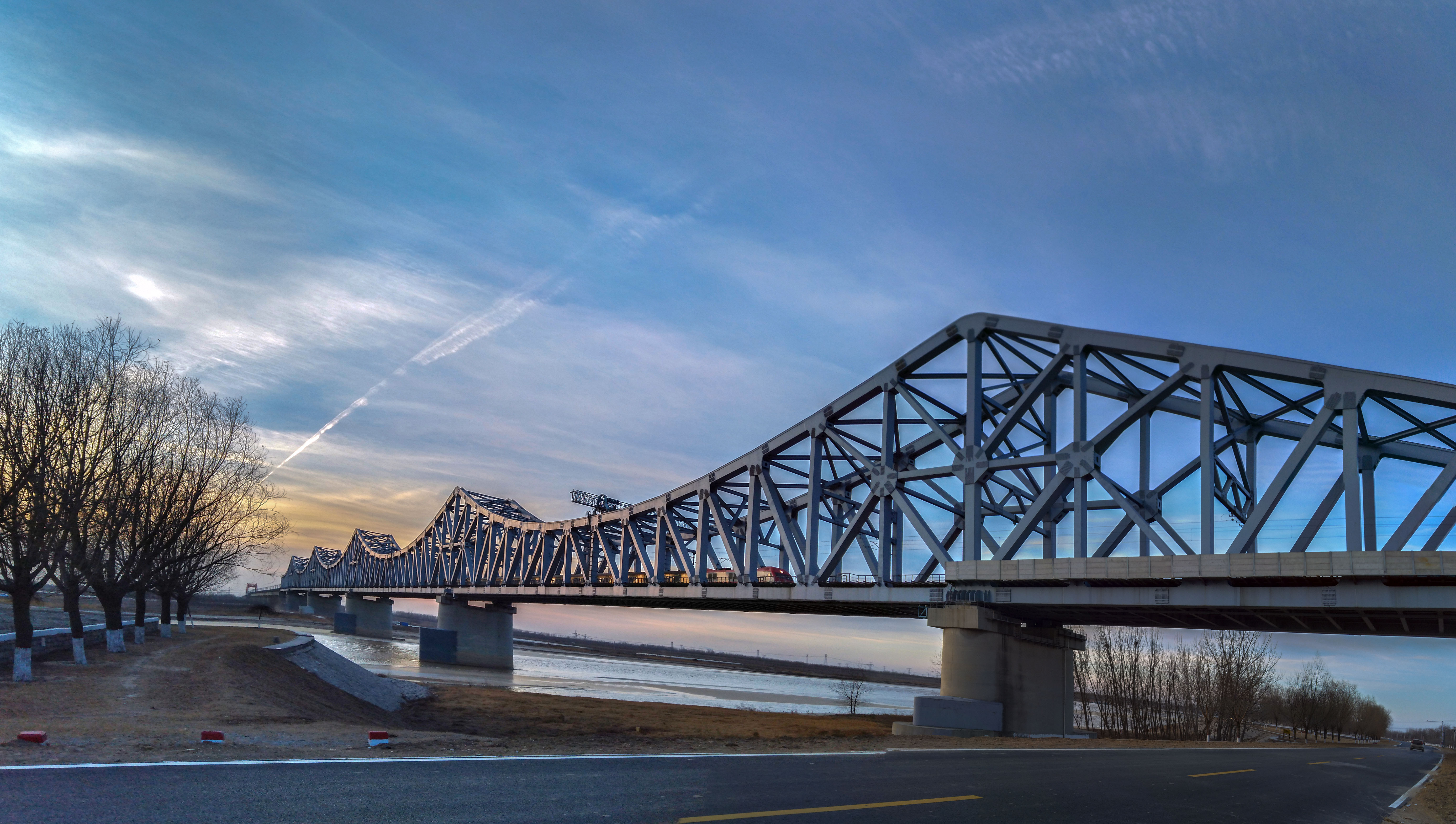 K1531次列车通过德大铁路龙居黄河特大桥